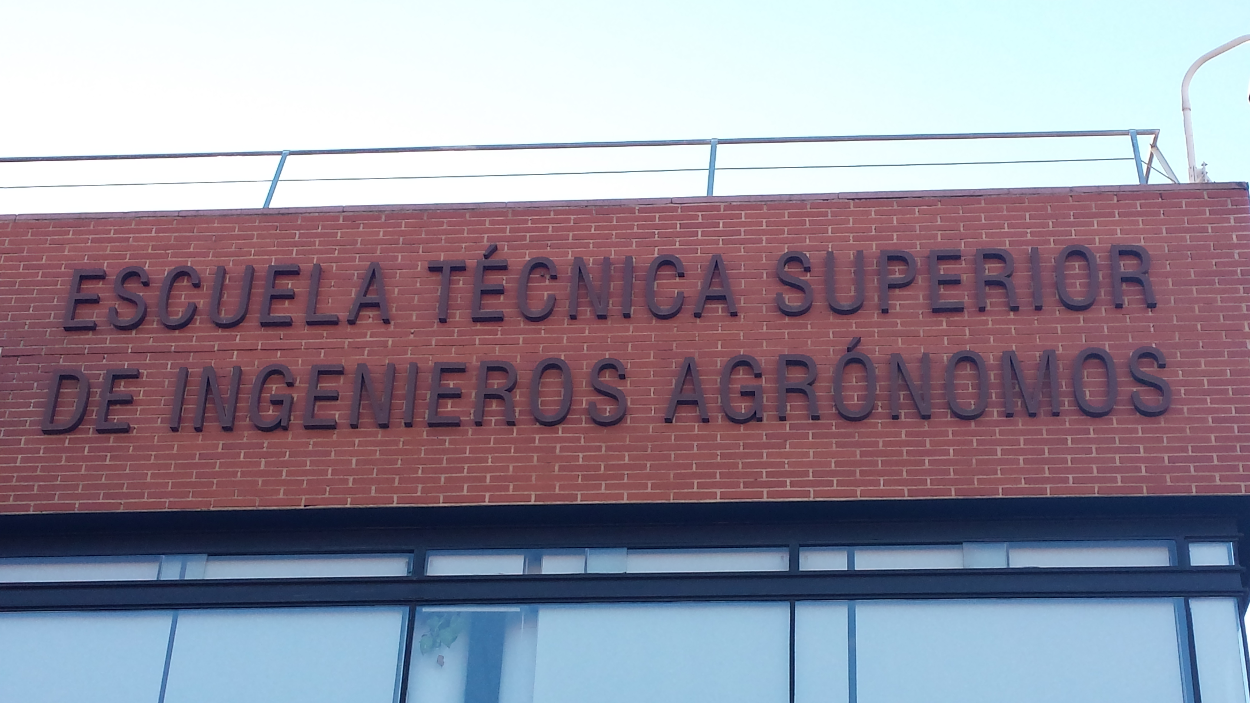 Logo.